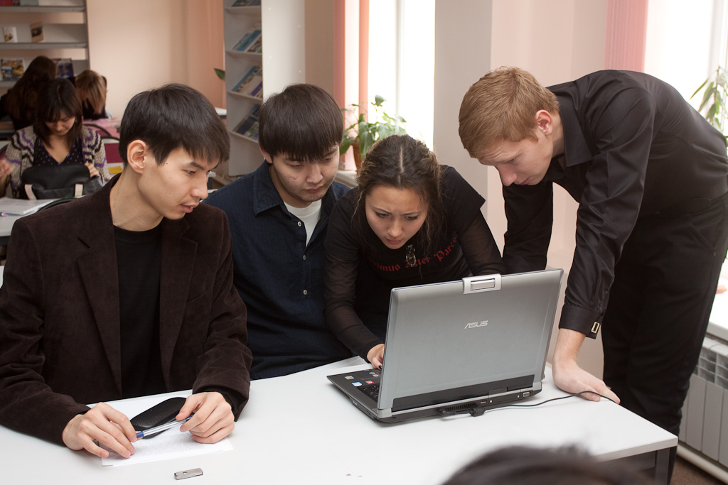 Учебный процесс в Международной академии бизнеса. Бакалавриат